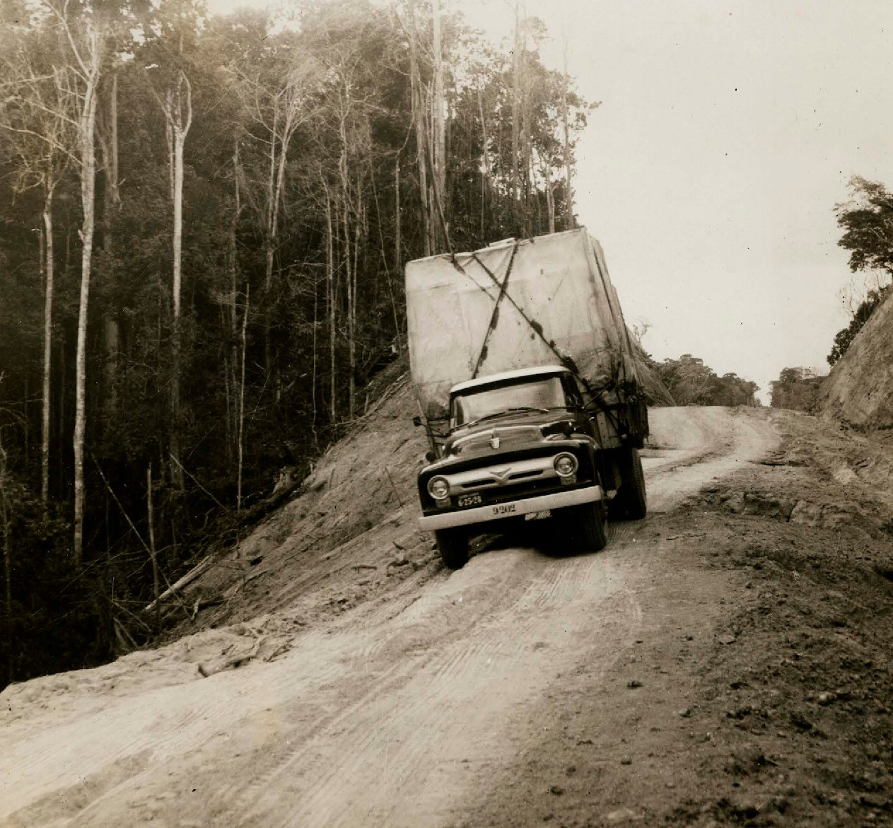 Fotografia do Fundo Correio da Manhã, sob a guarda do Arquivo Nacional.